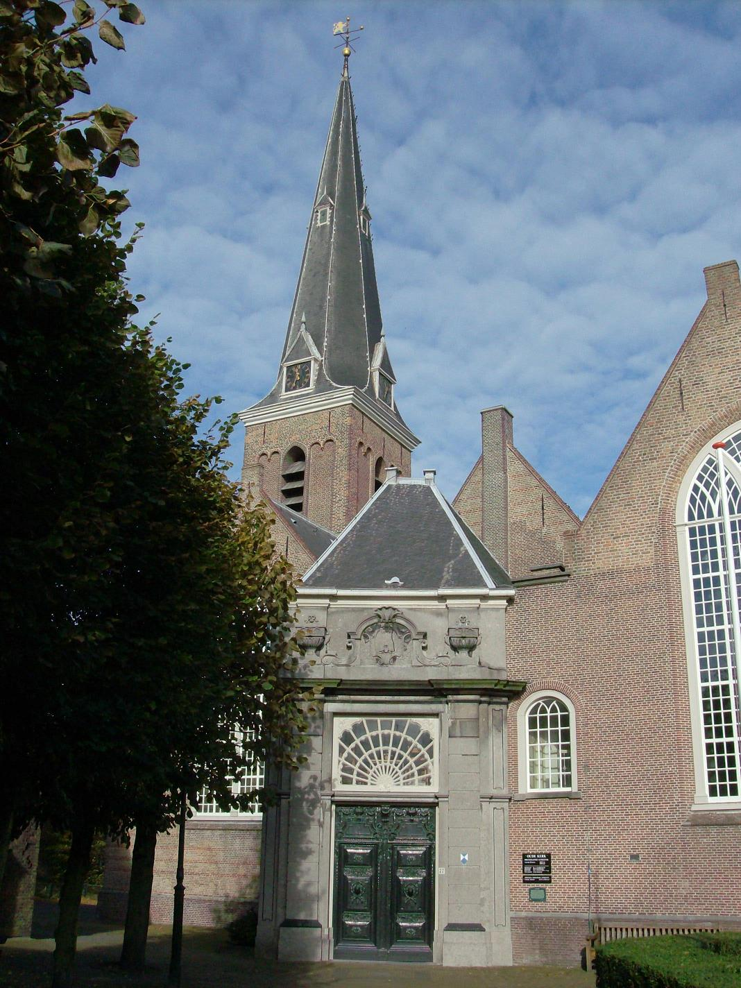 Oude Kerk te Voorburg, Nederland. Old Church, Voorburg, Netherlands.jpg